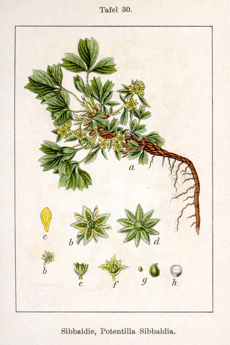 Sibbaldia procumbens L. var. procumbens, syn. Potentilla sibbaldia Griess. Original Descripion Sibbaldie, Potentilla sibbaldia